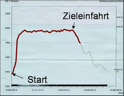 Puls während downhill